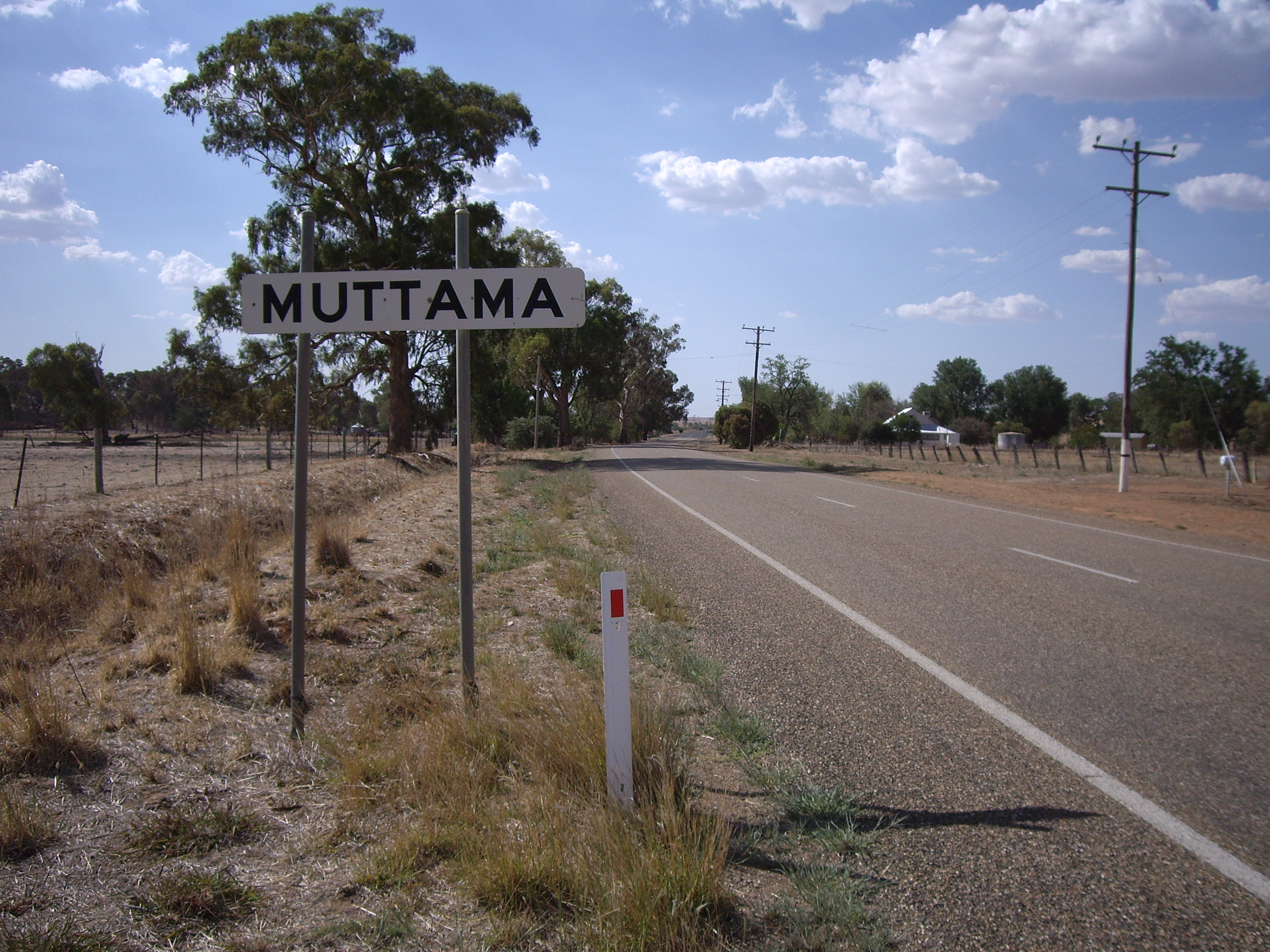 Entering Muttama